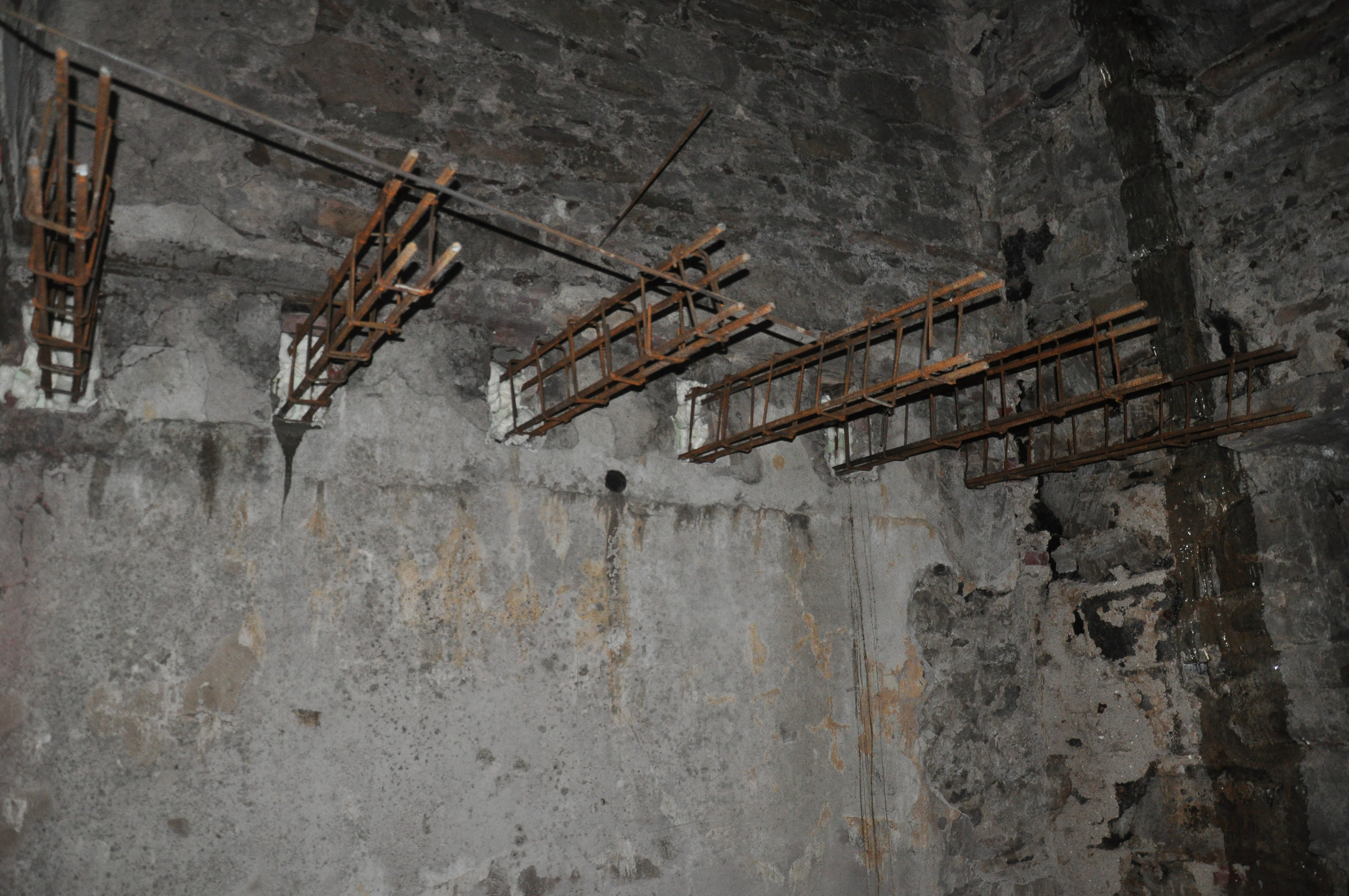 арматура для монтажу залізобетонного перекриття